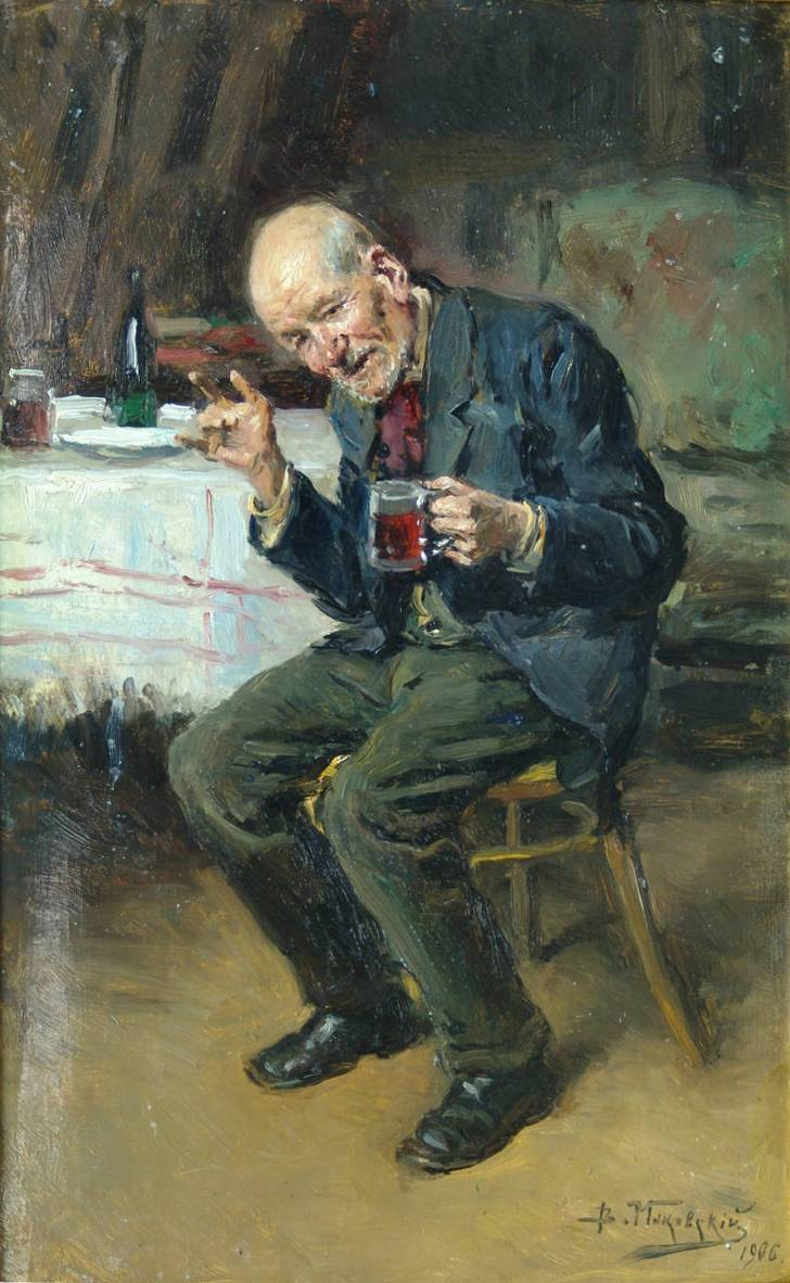 «Пьяница»